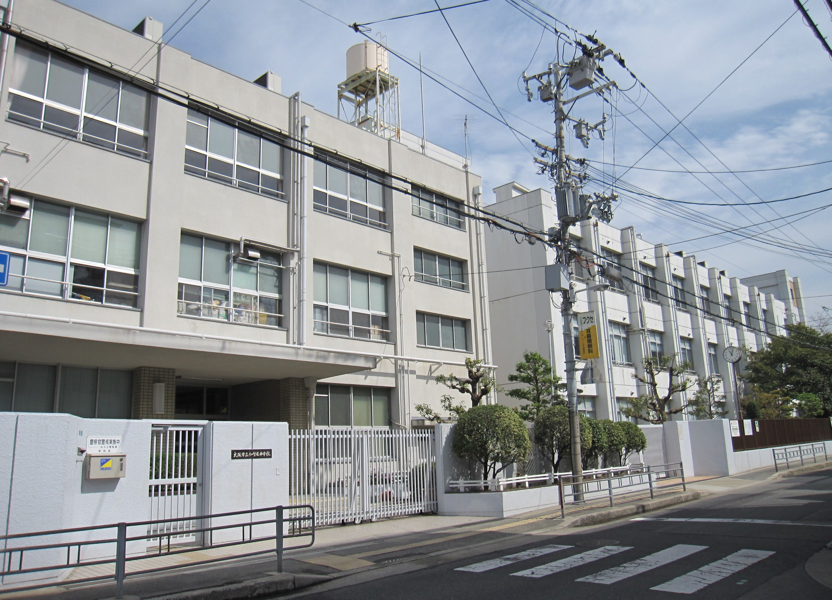 大阪市立加賀屋中学校